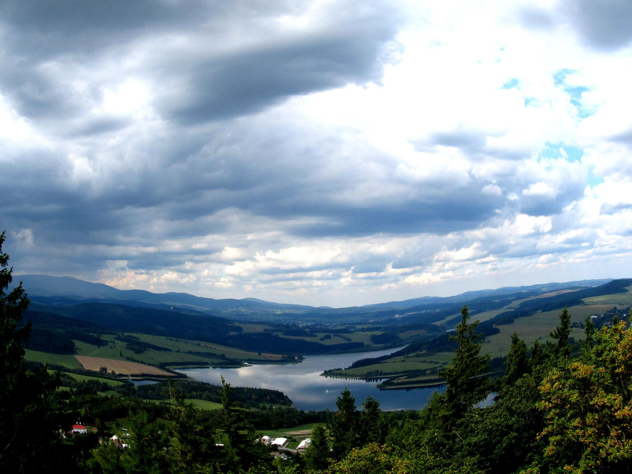 Okolí obce Dlouhá Stráň